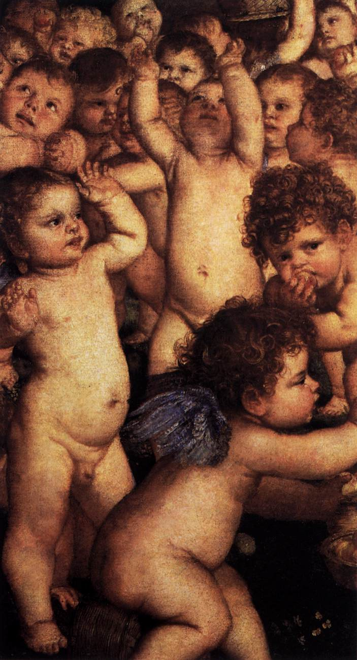 La obra, titulada Ofrenda a Venus, es uno de los lienzos de Tiziano que se conservan en el Museo del Prado.